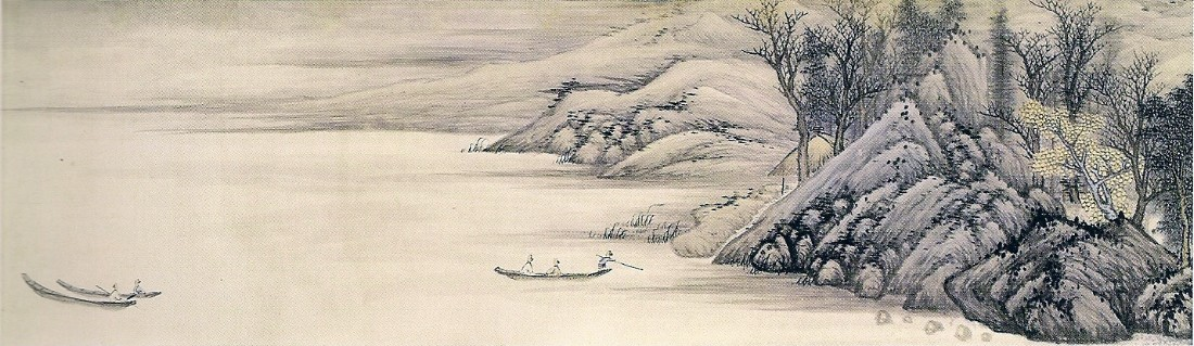 Vision fugitive de la ville de pierre, du peintre chinois Gao Cen, 1643-1679, section d'un rouleau portatif, encre et couleurs sur soie, 36,4x701,8cm. Musée du palais impérial. Beijing.